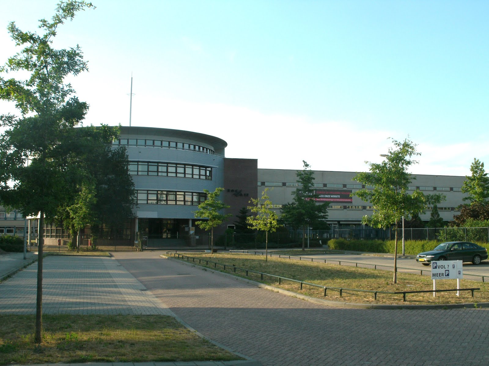 Regional education centre ROC A12 Ede